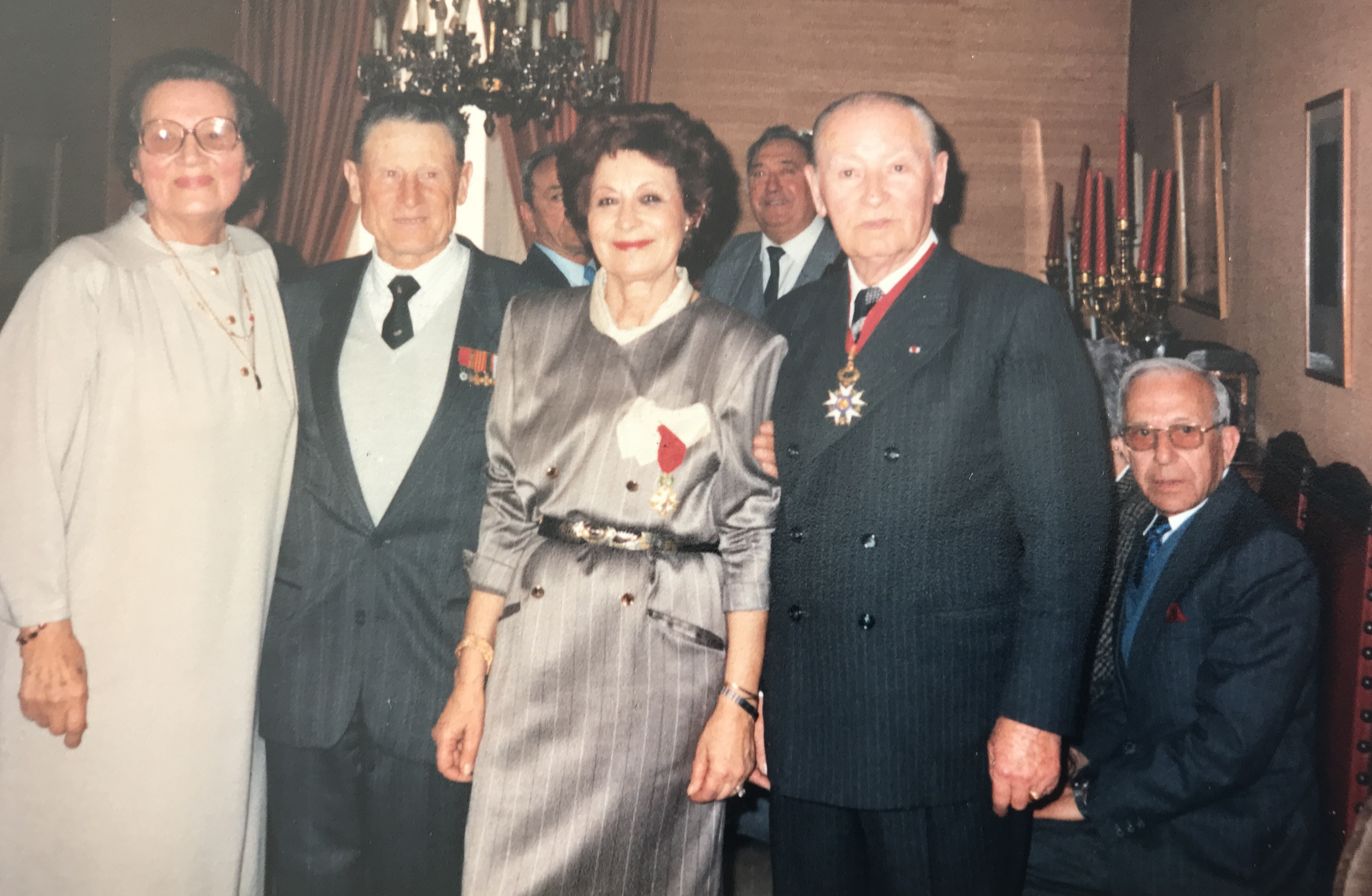 Braulia Cánovas Mulero (en el centro de la imagen) recibiendo la Legión de Honor en 1988